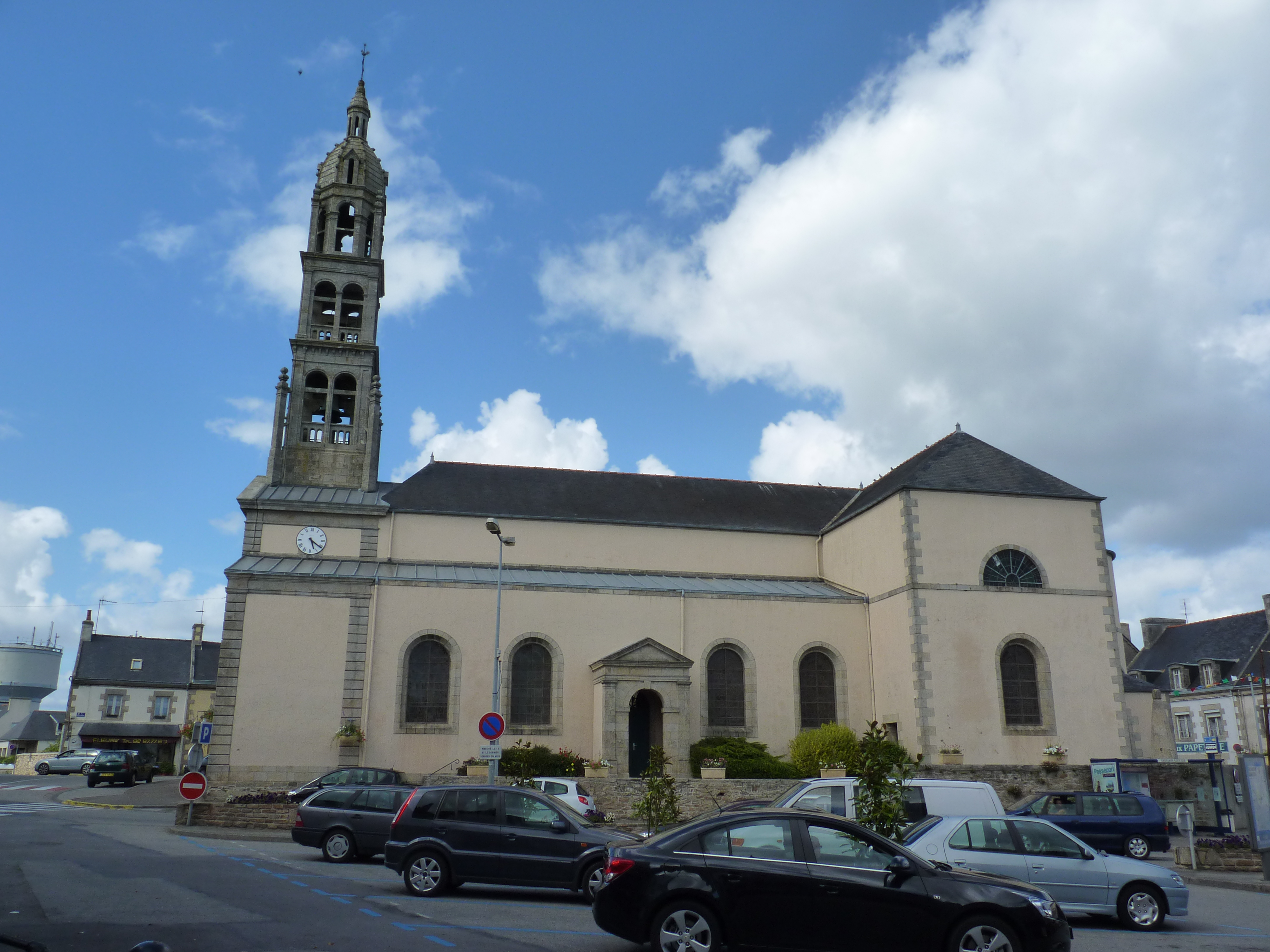 Eglise Saint Eneour à Plonéour lanvern